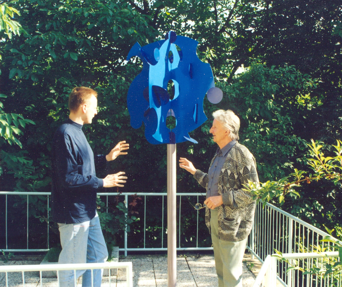 Ante Vranković i Vjenceslav Richter